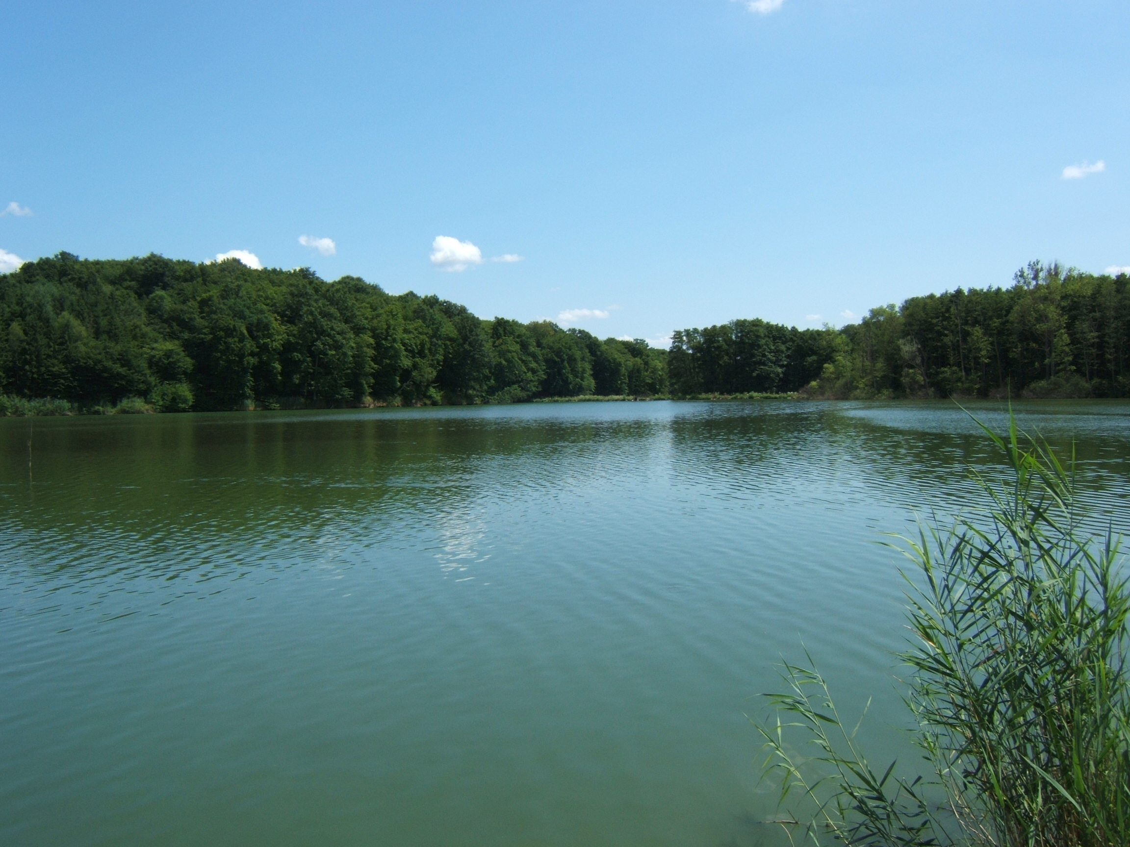 Ágneslaki tó